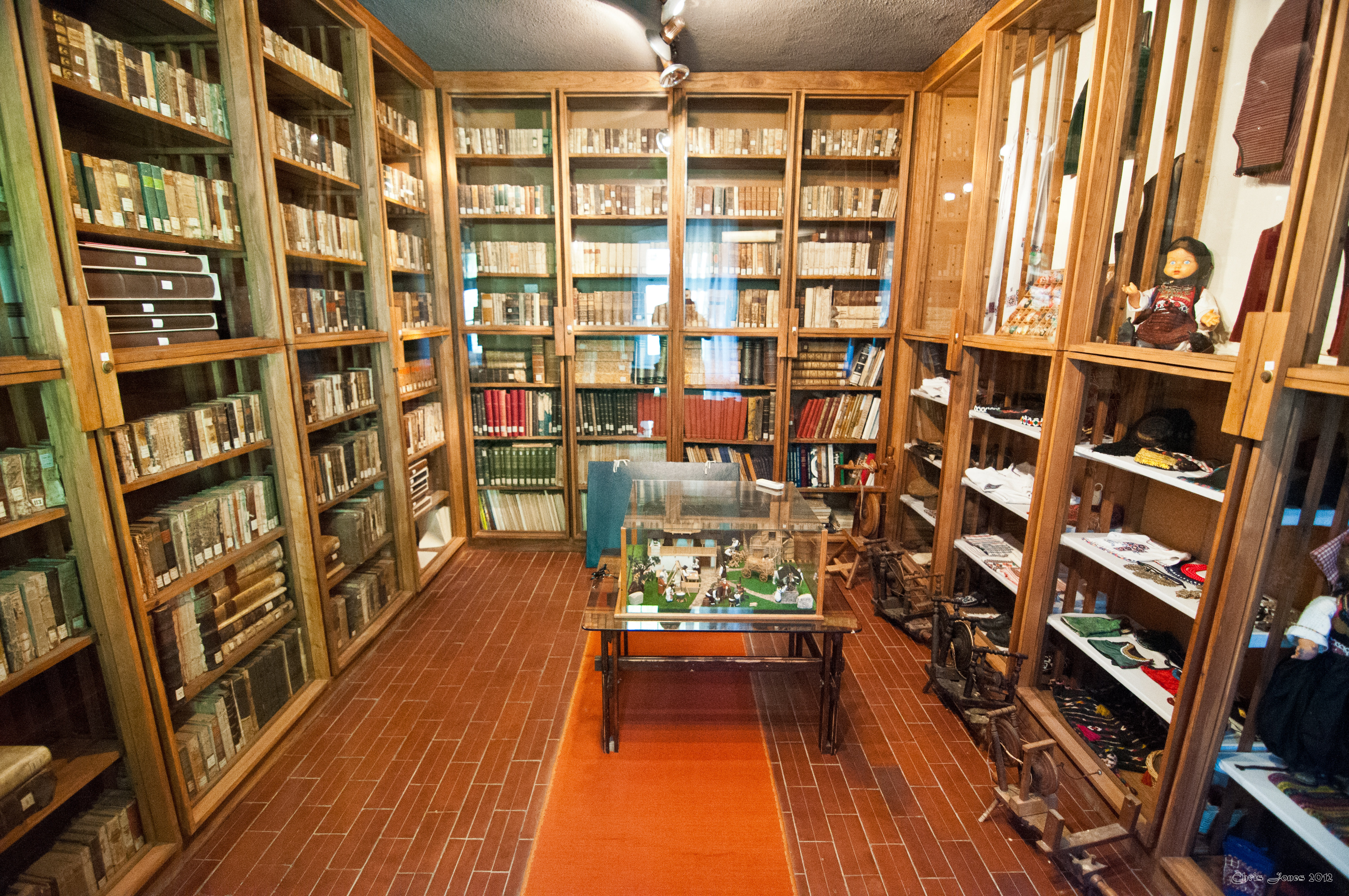 Kraljeva Sutjeska - Franciscan Monastery